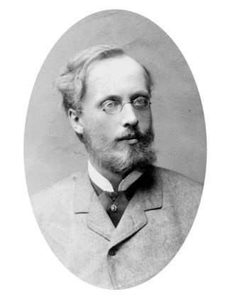 Карл Теодор Флодин (1858-1925)